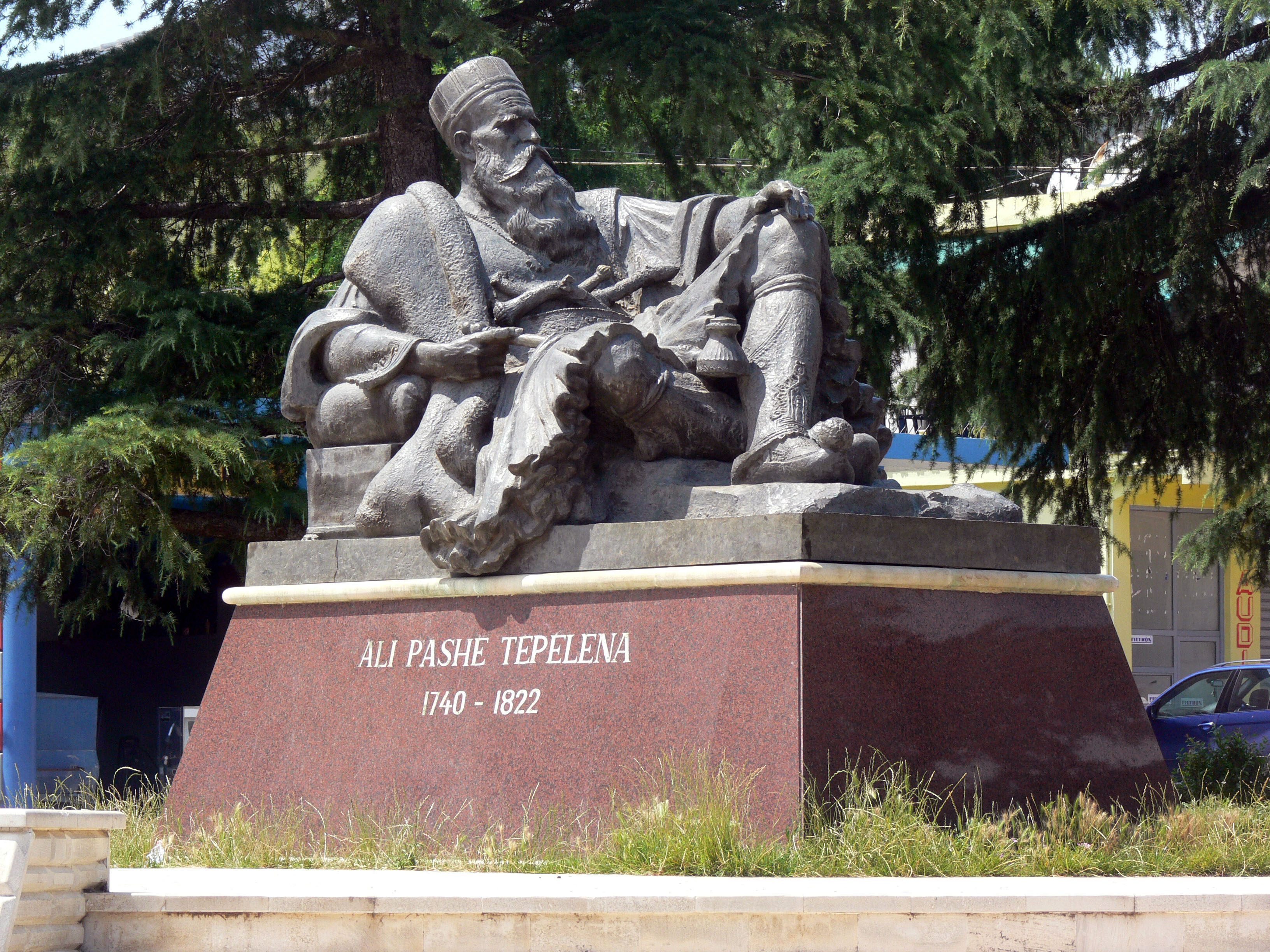 Ali Pascha Denkmal in Tepelena